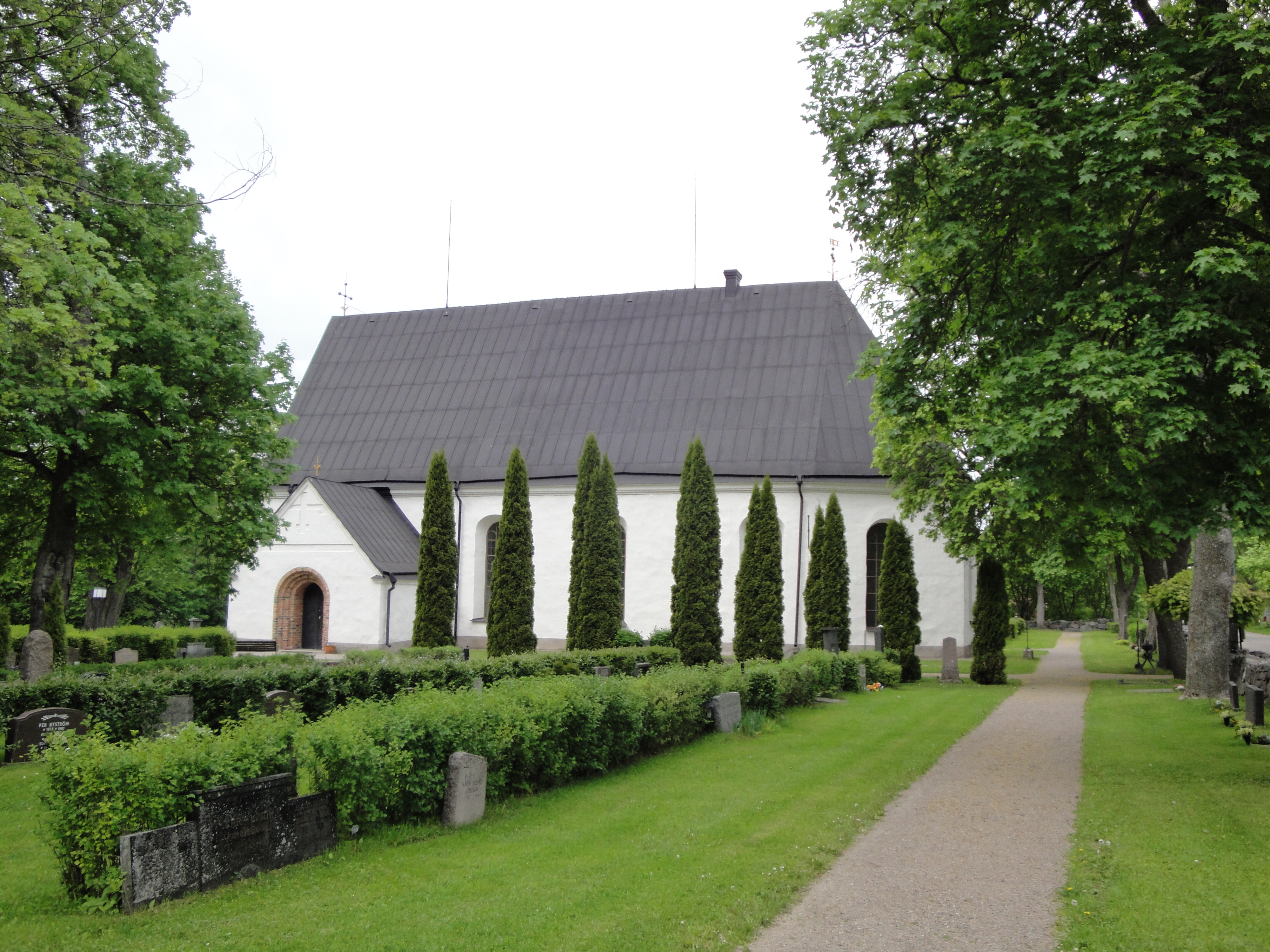 Älvkarleby kyrka, Älvkarleby kommun.